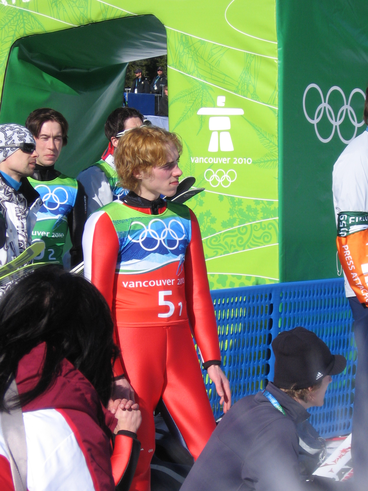 Czech ski jumper Antonín Hájek at Winter Olympics 2010.